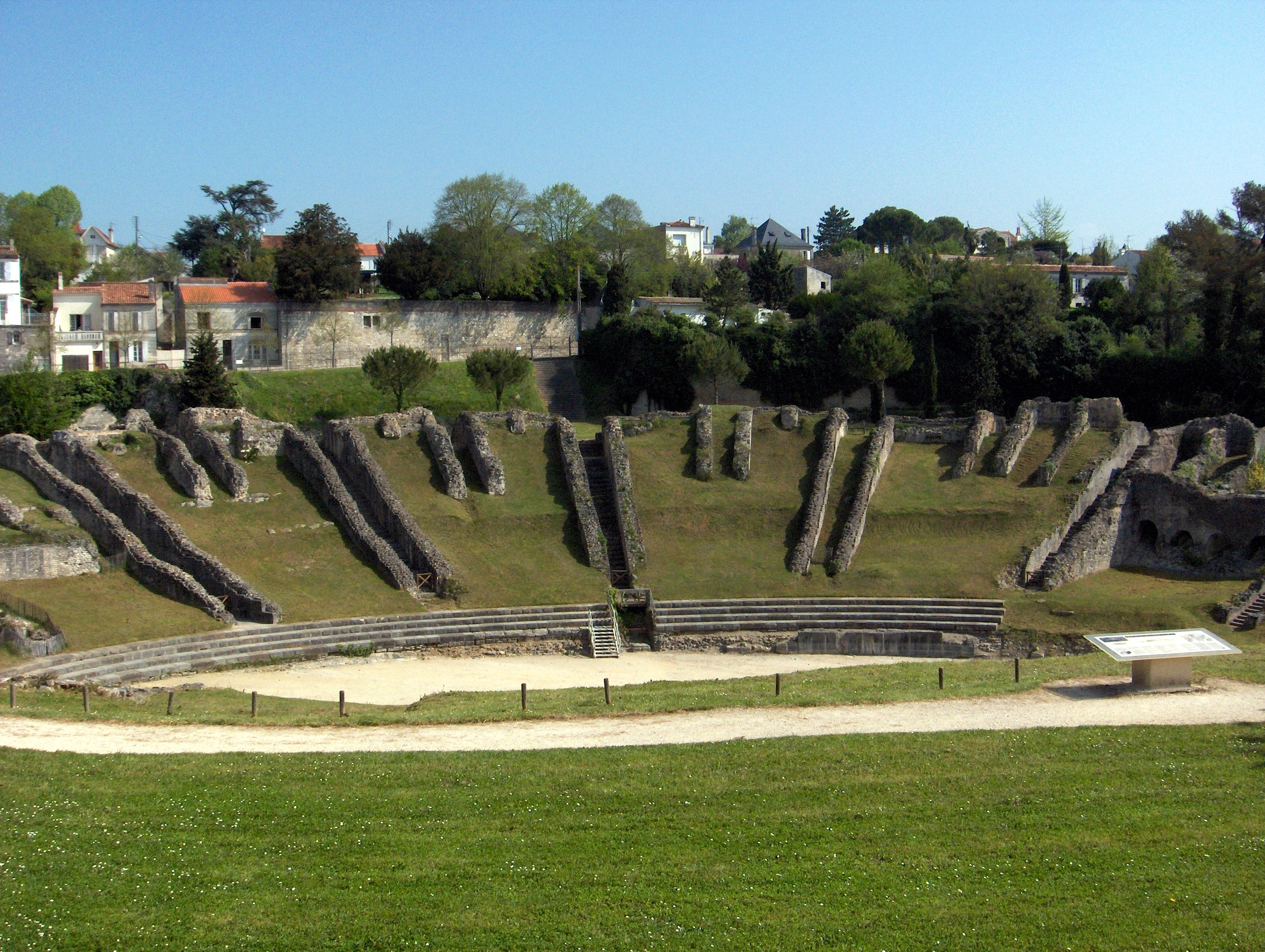 Amphithéâtre gallo-romain à Saintes, Charente-Maritime, France.